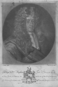 Stephen Fox (1627-1716)